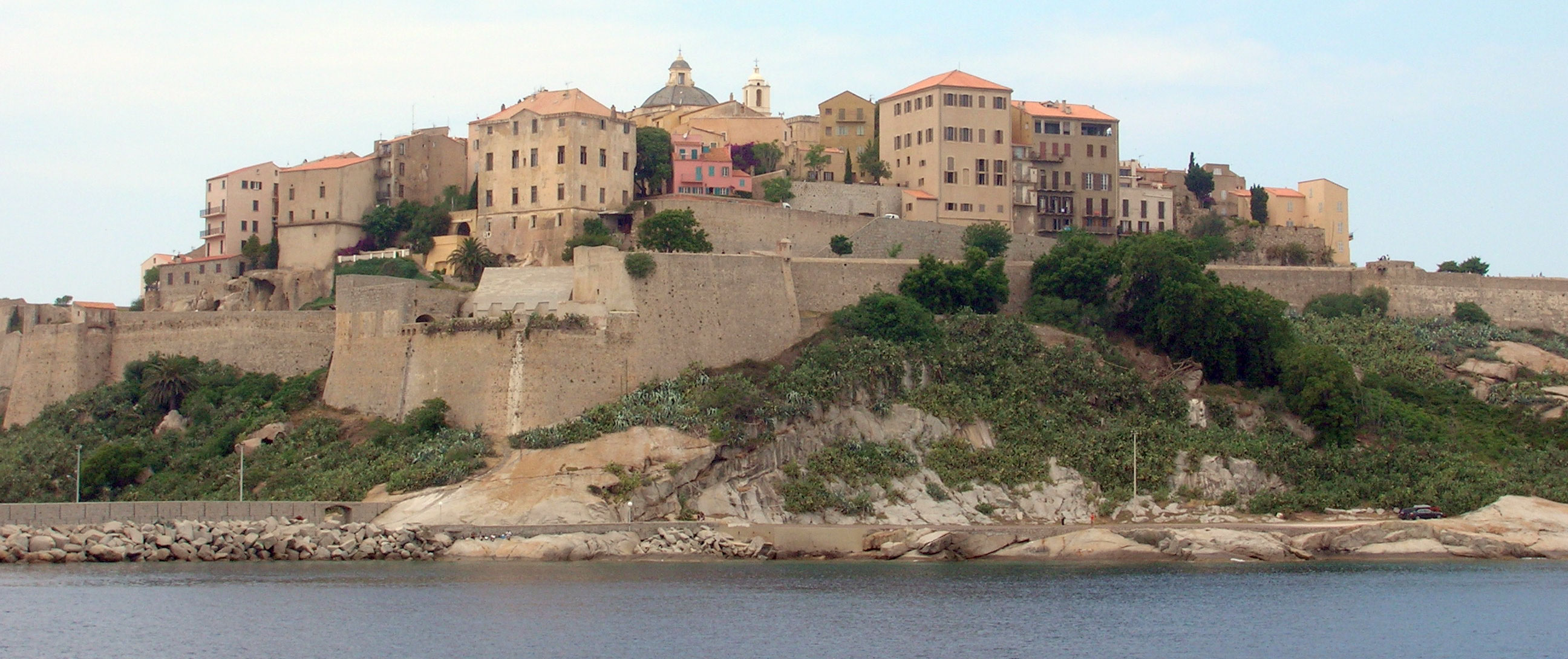 D'Zitadell zu Calvi Source:Eege Foto vum User:ernmuhl Lizenz